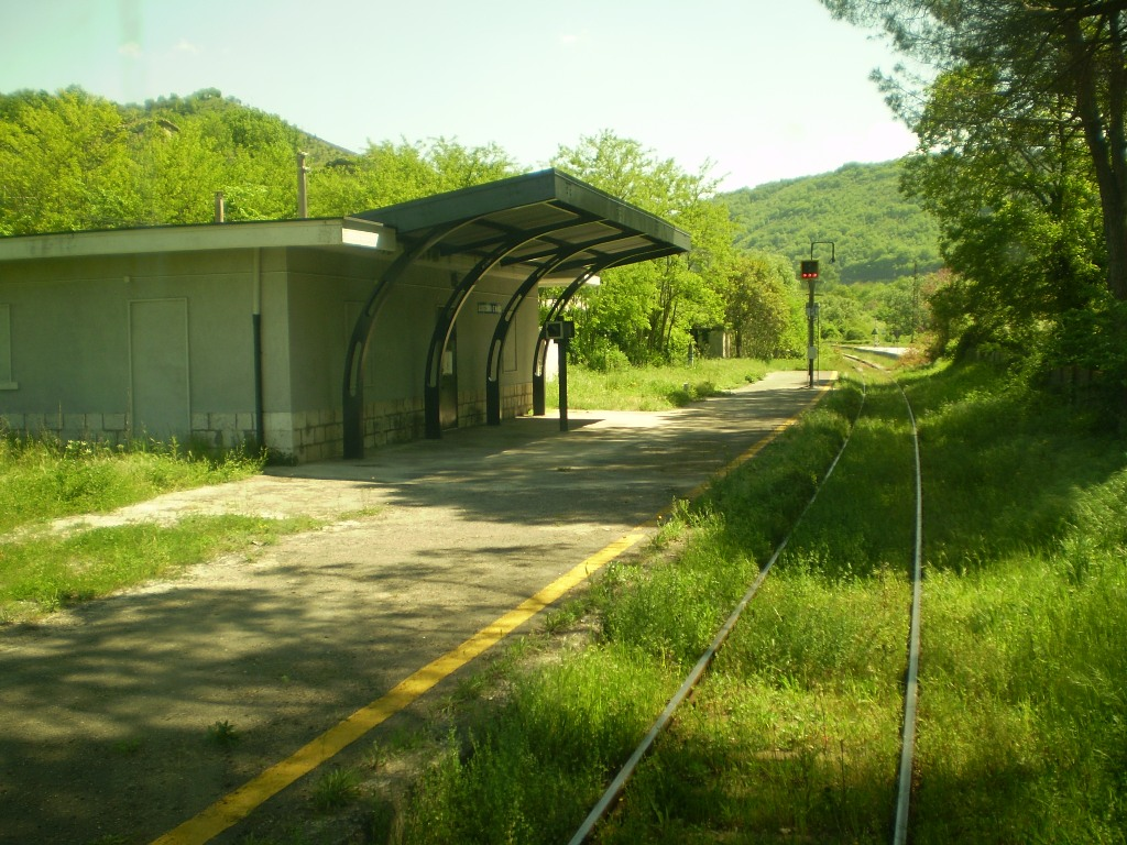 La stazione di Luogosano - San Mango sul Calore